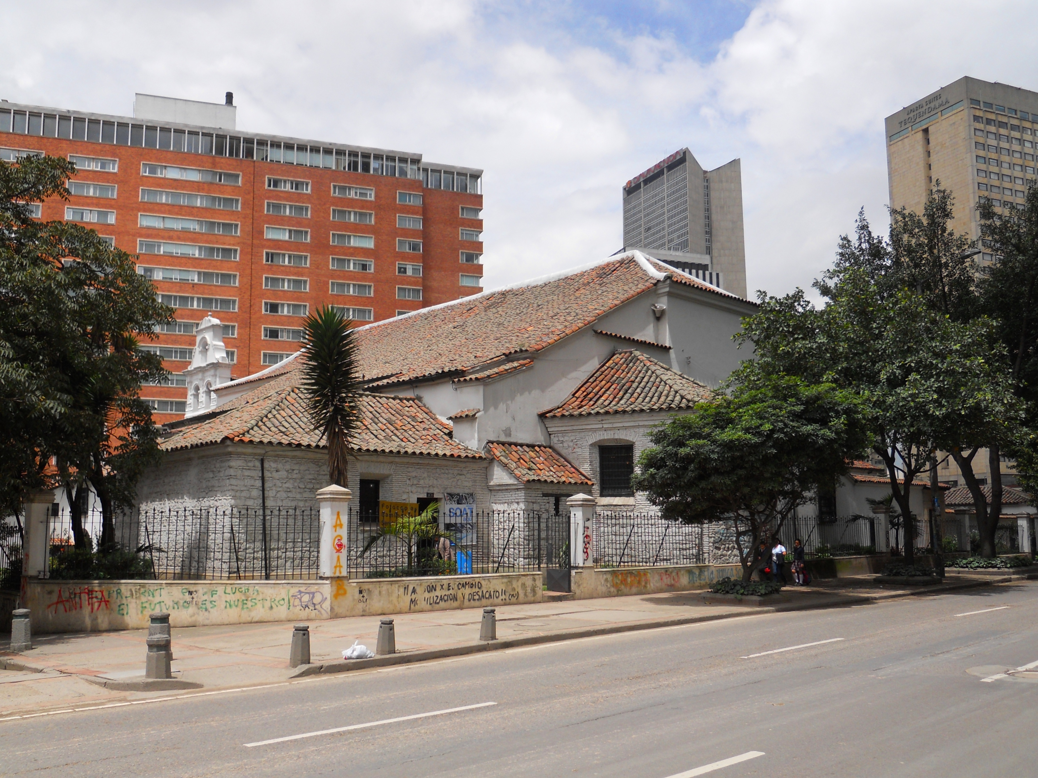 Iglesia de San Diego en Bogotá.